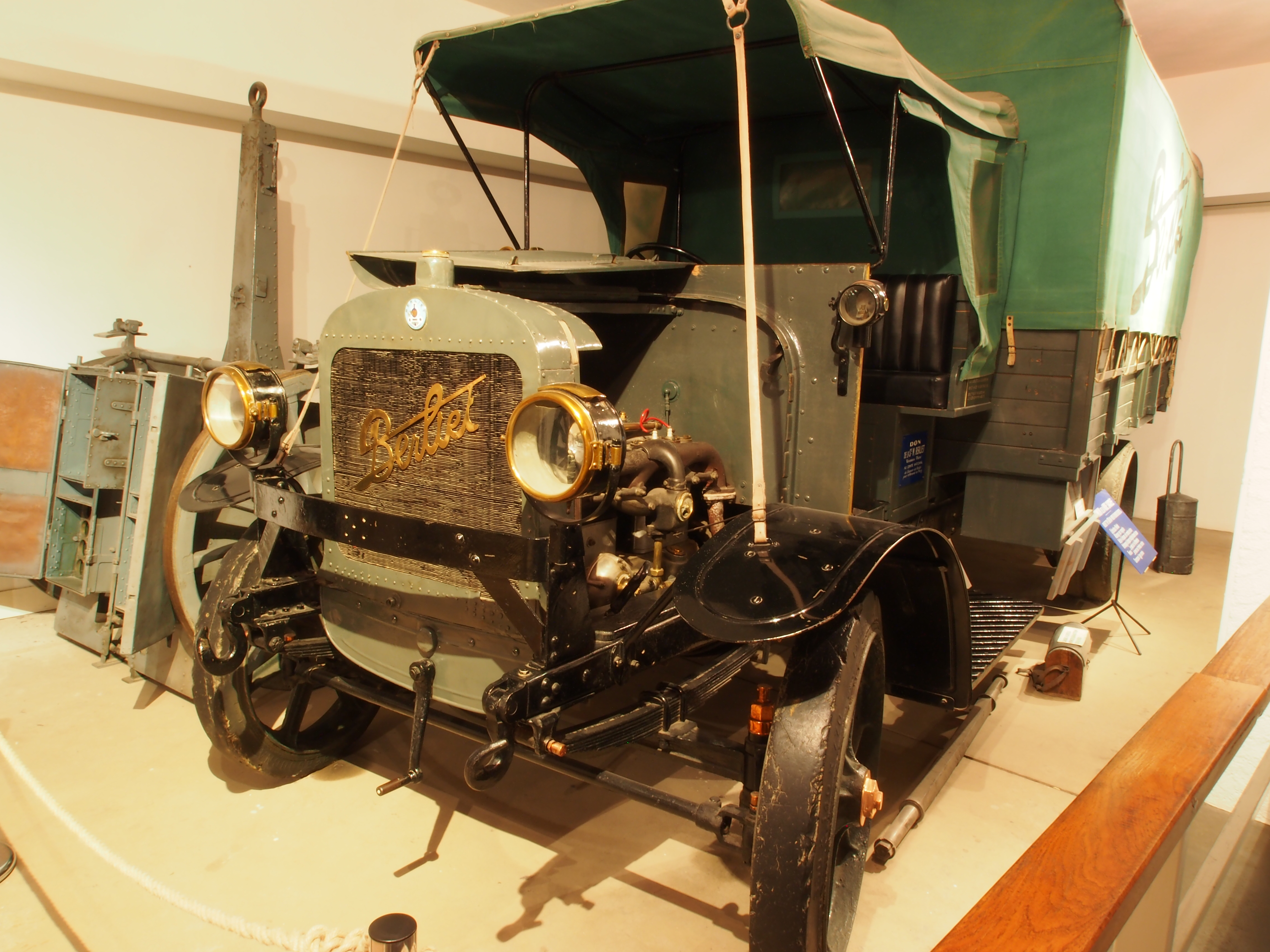 WWI berliet truck.